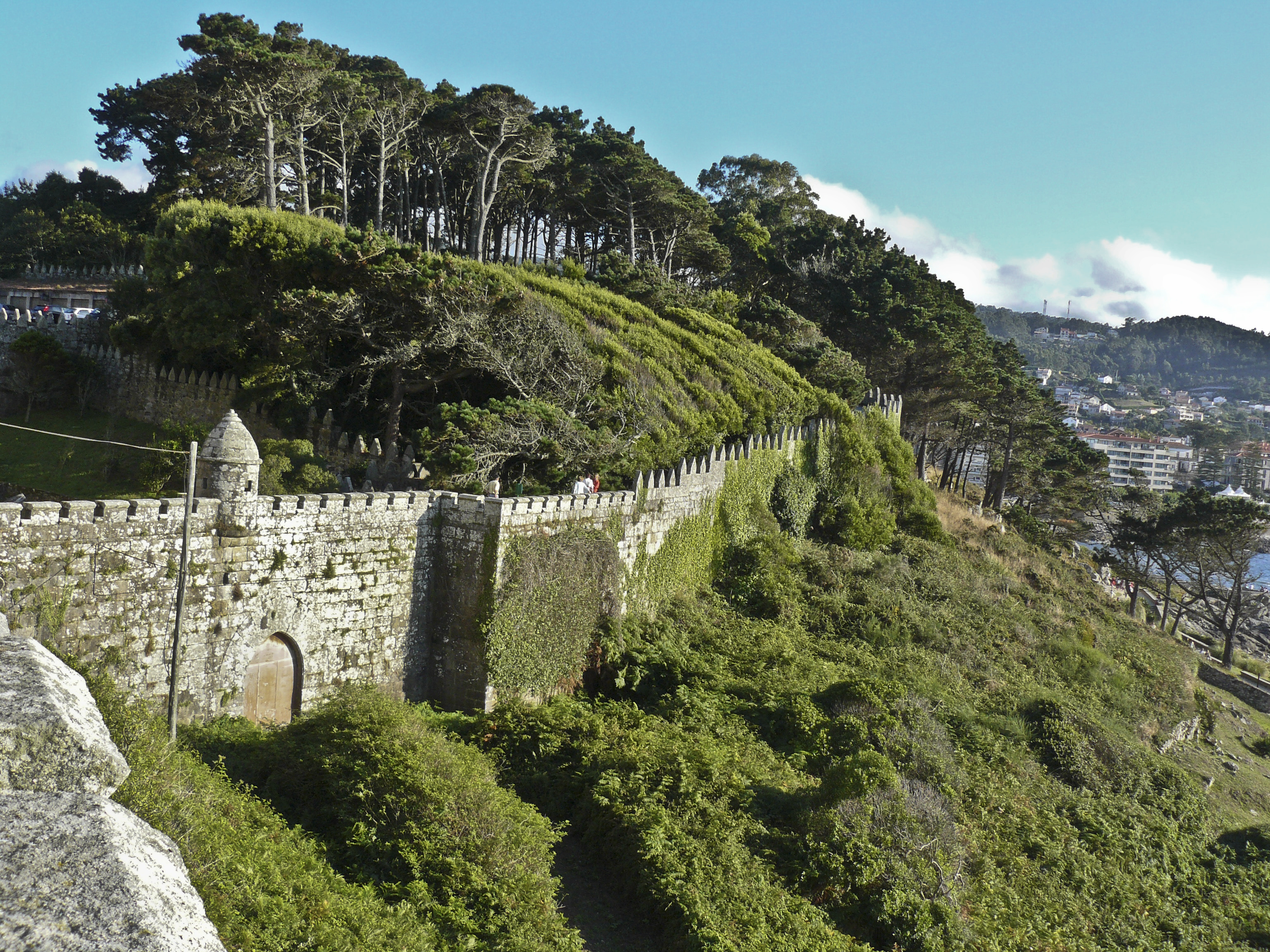 Muralla do Castelo de Monterreal - Baiona